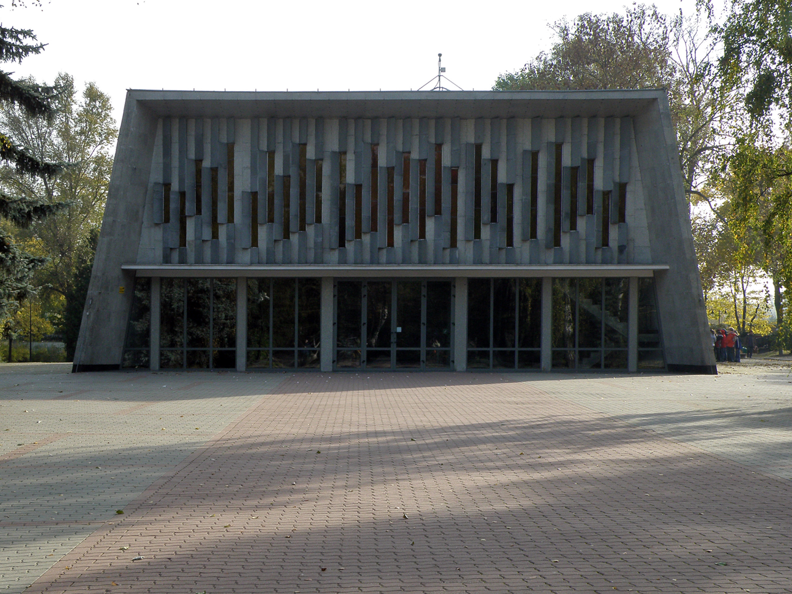 Warszawa, Powązki Wojskowe